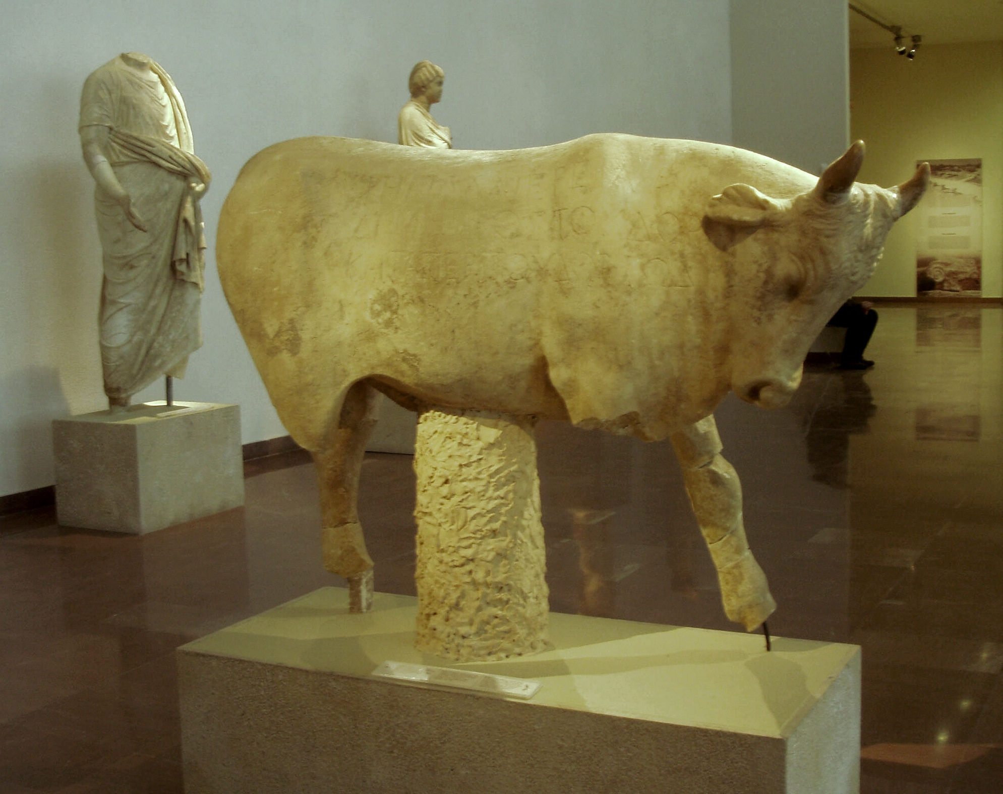 Stierfigur als Weihegabe, arch. Museum von Olympia